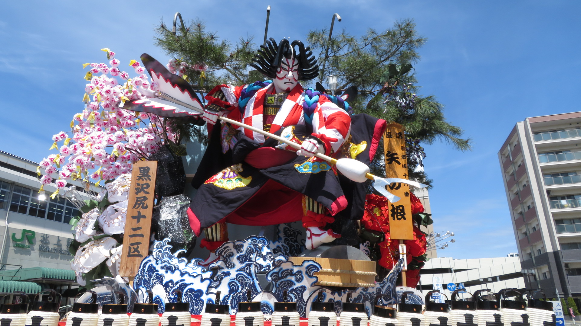 黒沢尻十二区山車。